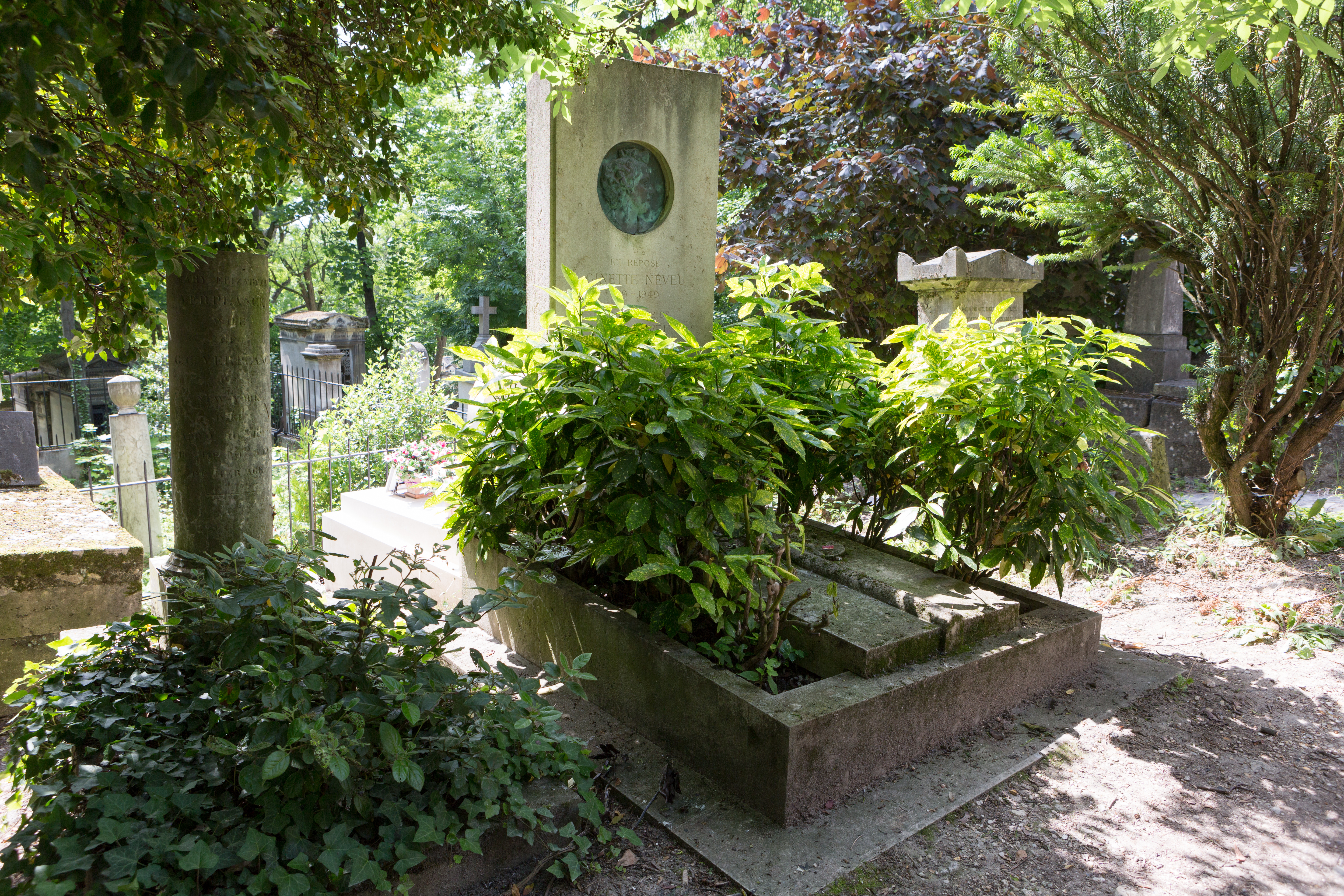 Sépulture de Ginette Neveu (1919-1949), violoniste morte dans l'accident du vol Paris-New York d'Air France aux Açores.